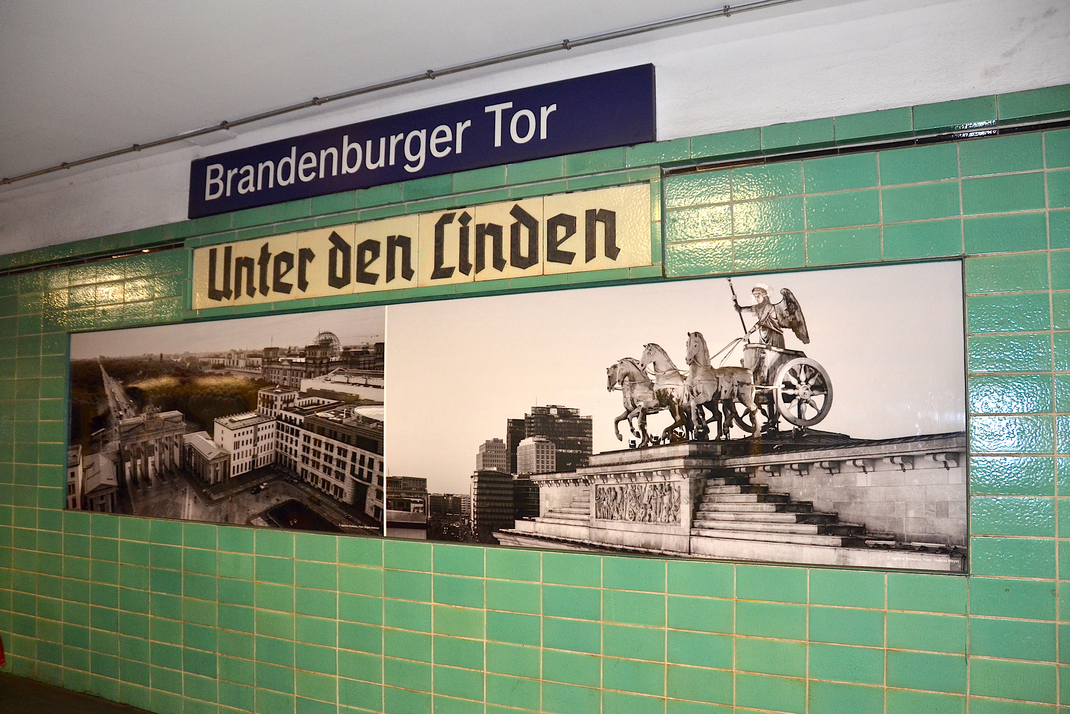 S-Bahnhof Berlin Brandenburger Tor, ehemals Unter den Linden